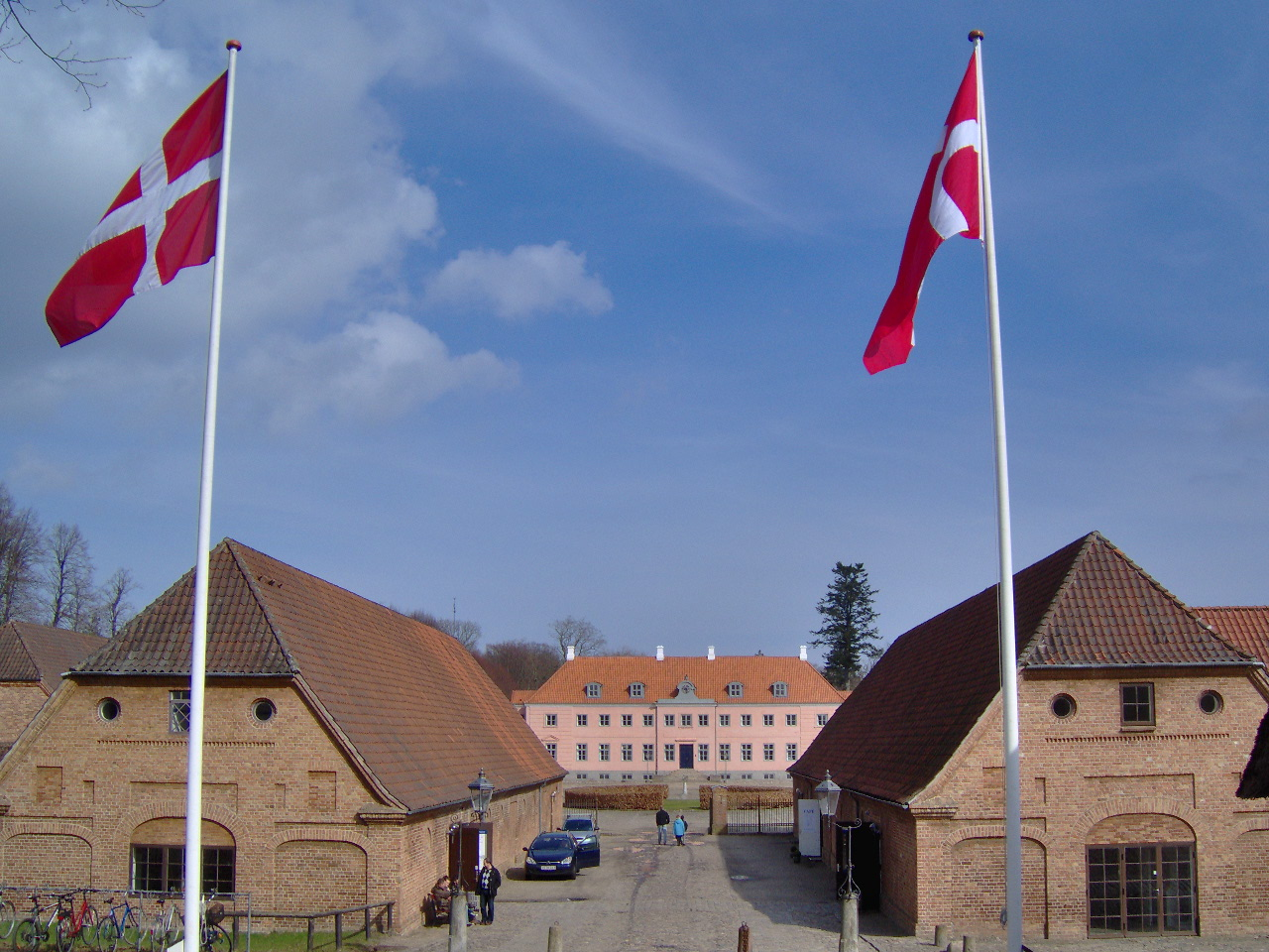 Føler man sig ikke en smule mere velkommen, når de ligefrem har hejst flaget? (Moesgaard)